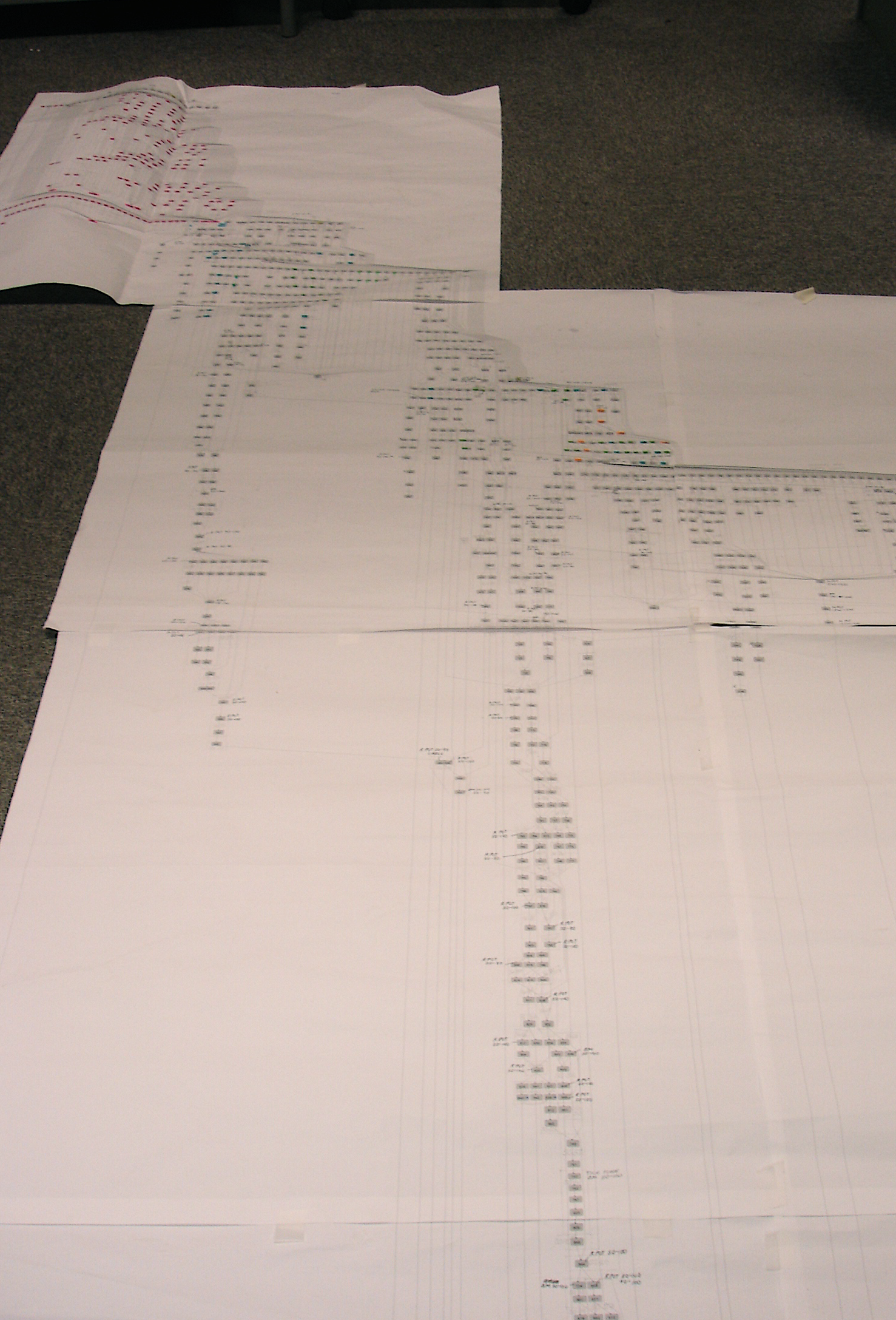 big matrix